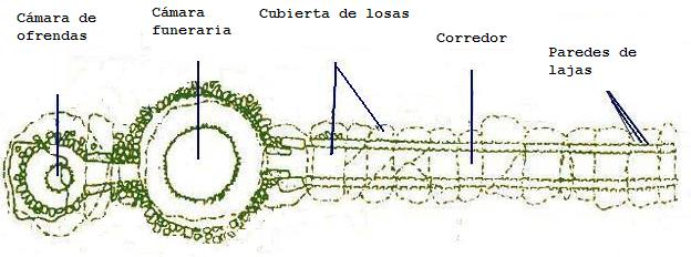 Plano del Dolmen de El Romeral, en Antequera (España). circa 1800 a. C.